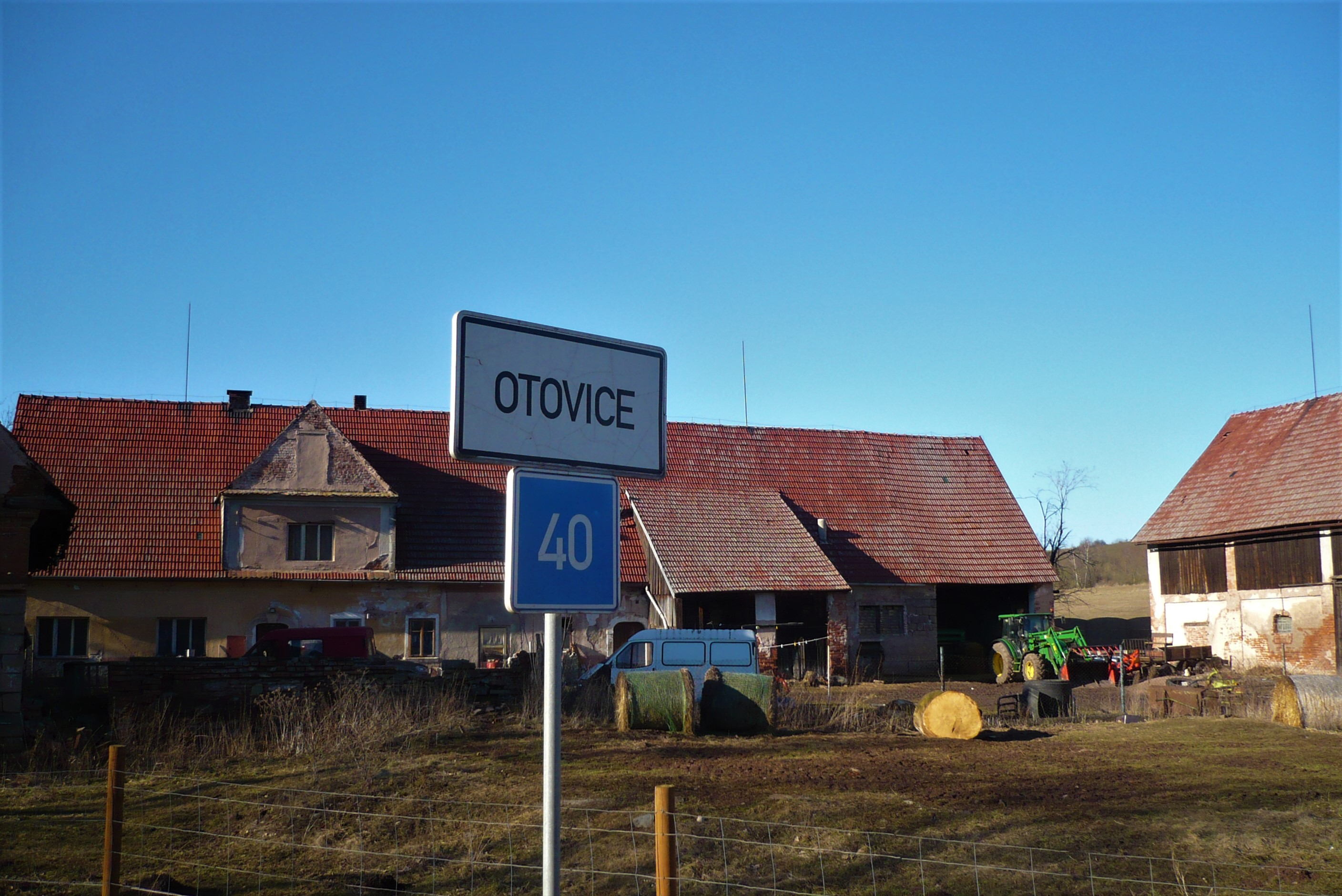 Otovice